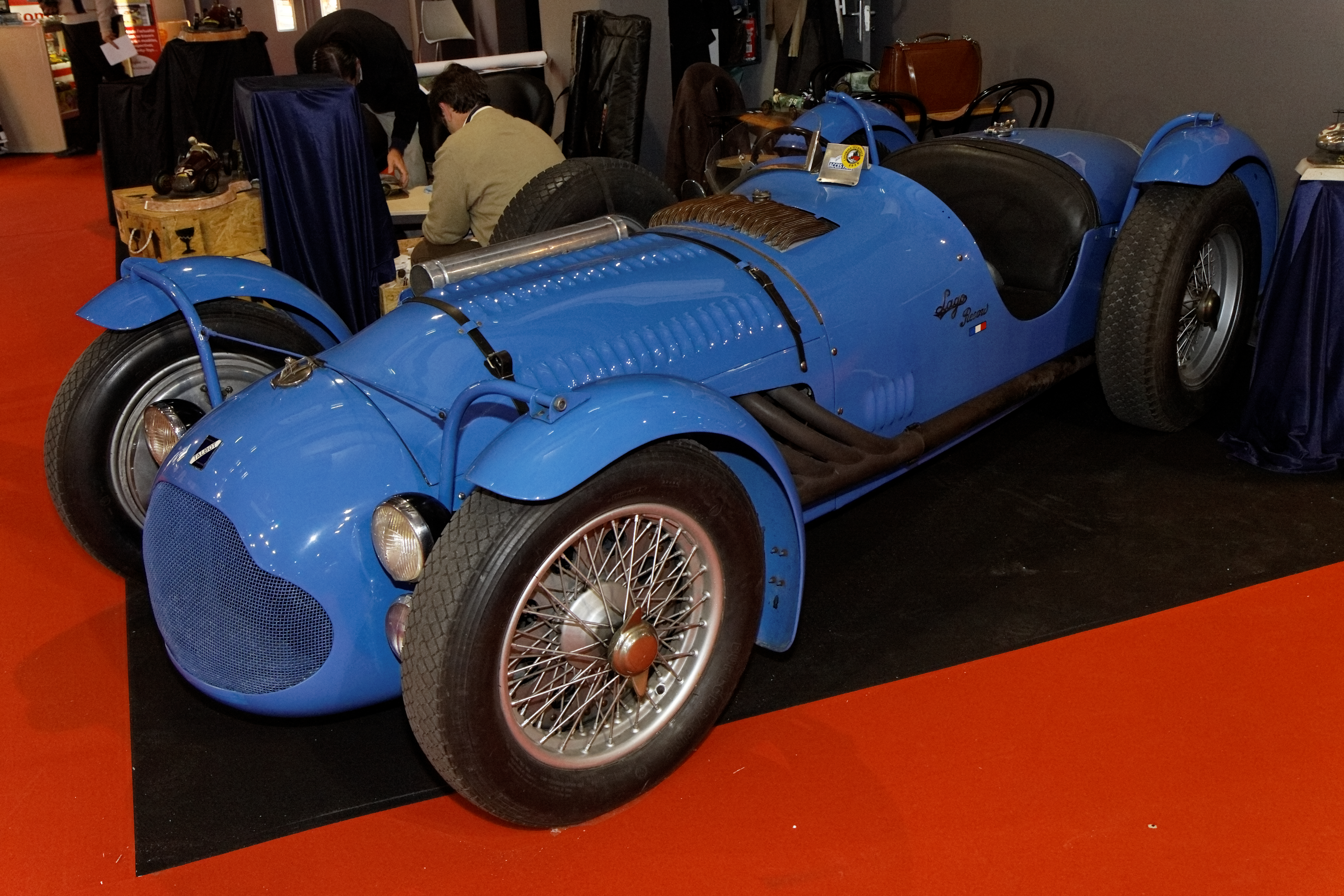 Talbot-Lago T26C-GS